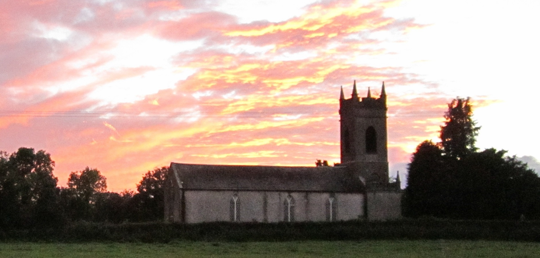 Eglise St Thomas de Rathowen, County Westmeath, Ireland